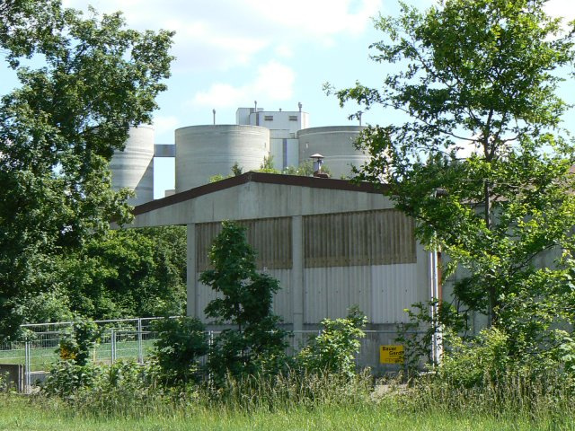 Zement Fabrik